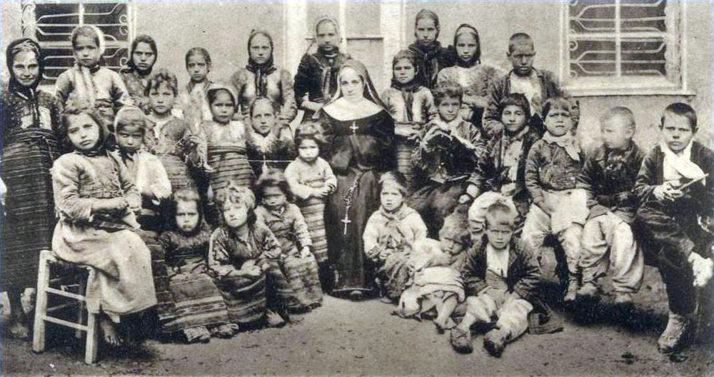 Евхаристинско училище в Палюрци